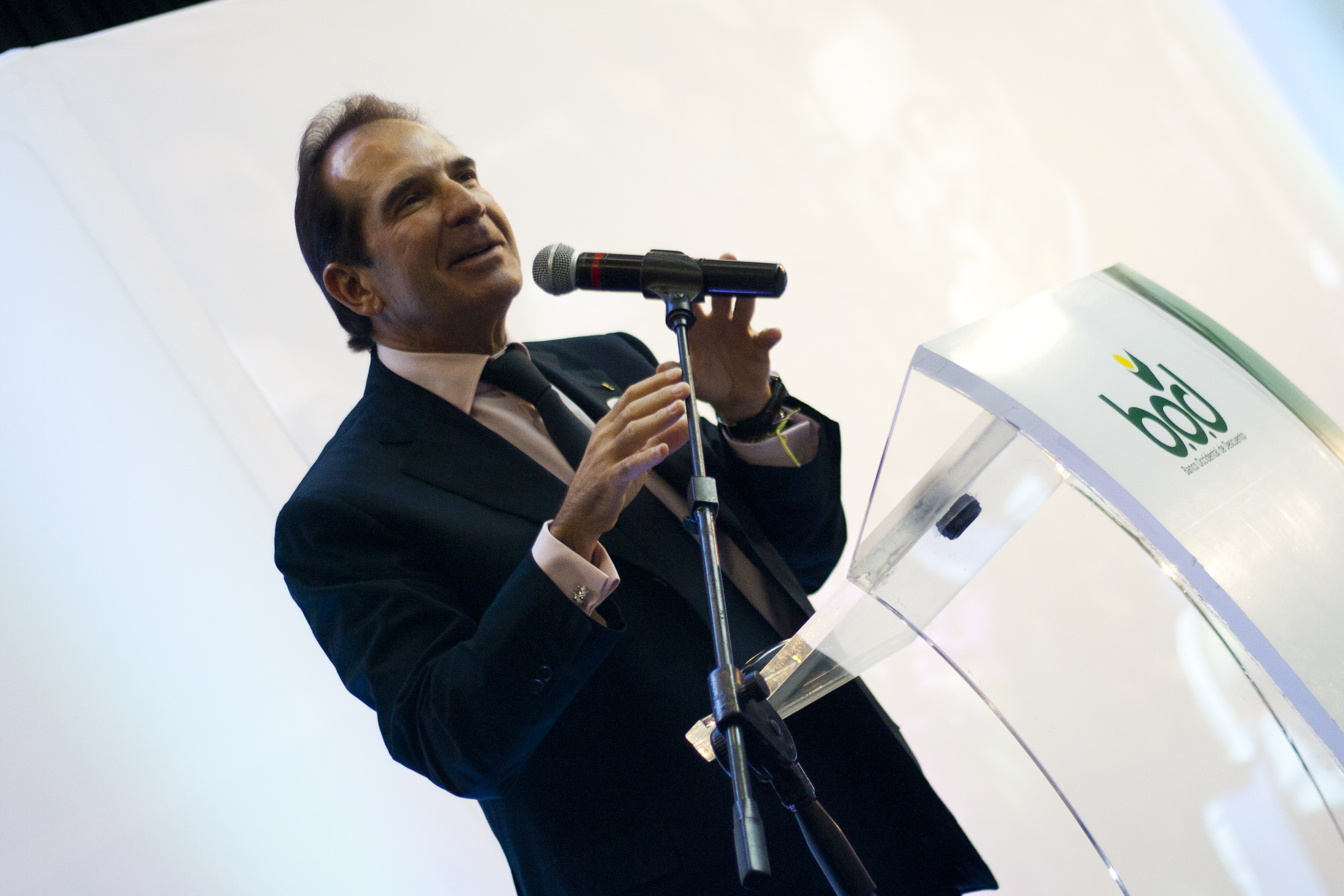 Víctor Vargas Irausquin, durante la presentación del Plan Estratégico del B.O.D., en la Hacienda de Agualinda, Venezuela